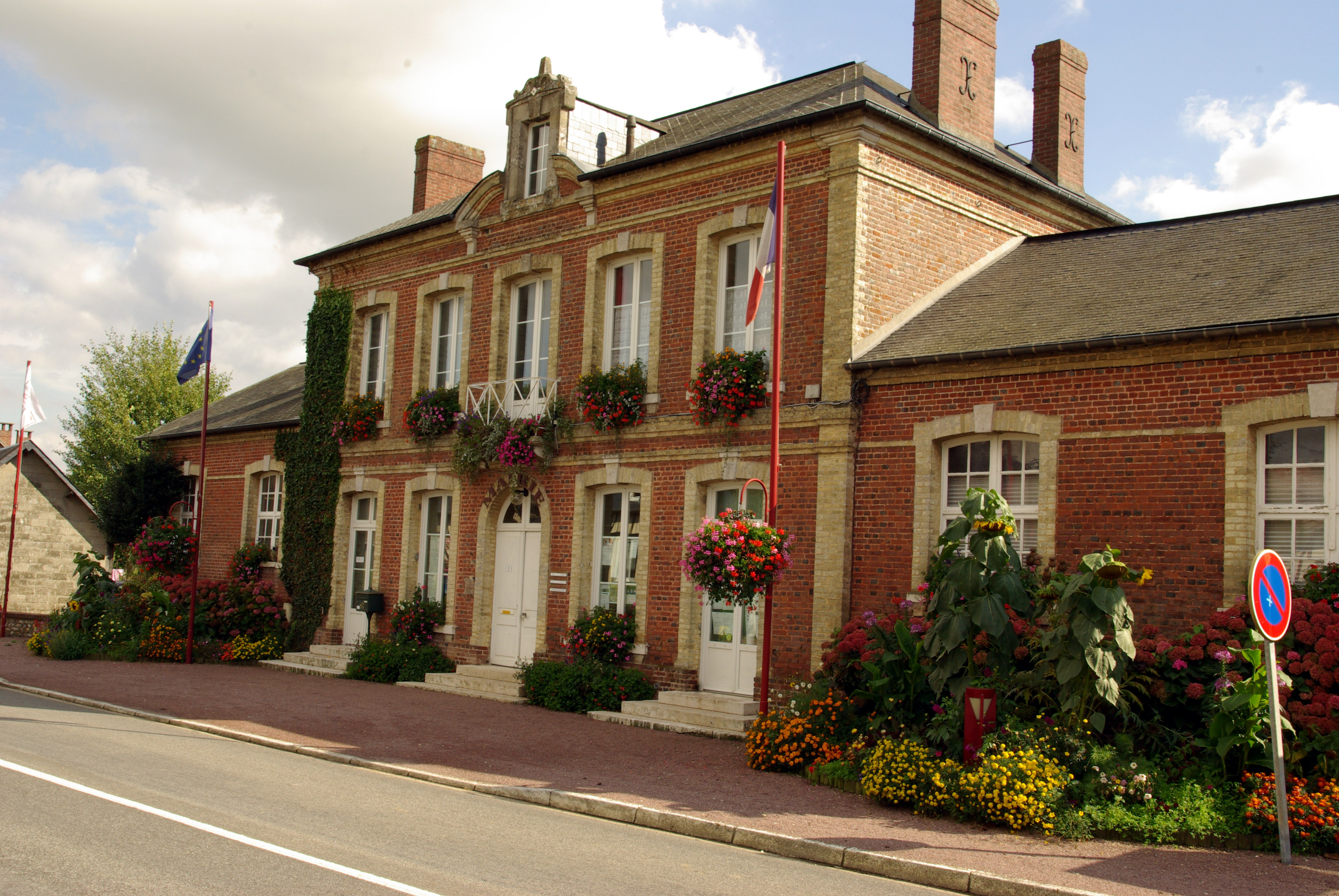 Mairie de Fourmetot